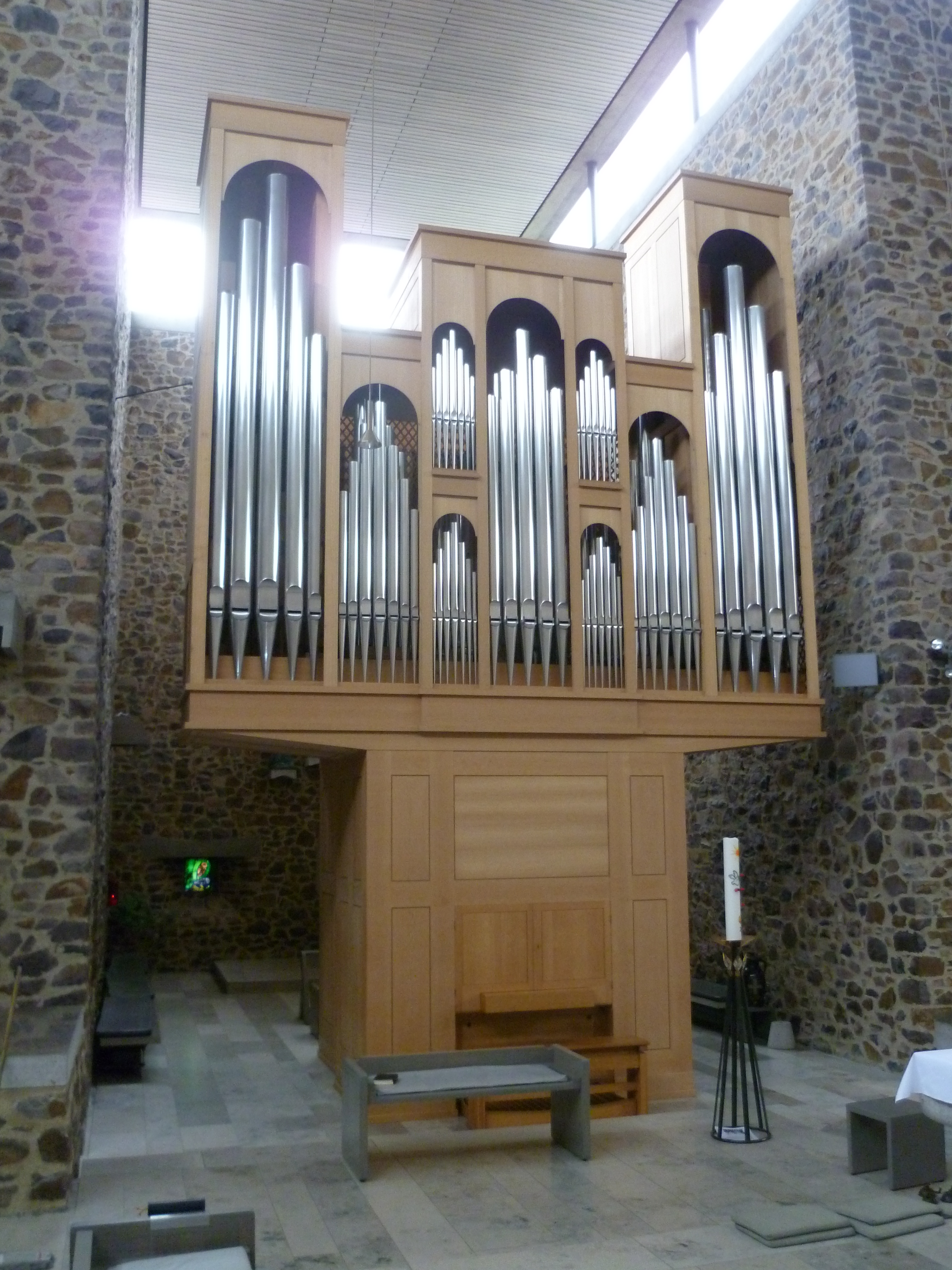 Katholische Kirche St. Martin in Idstein - Melbold-Orgel